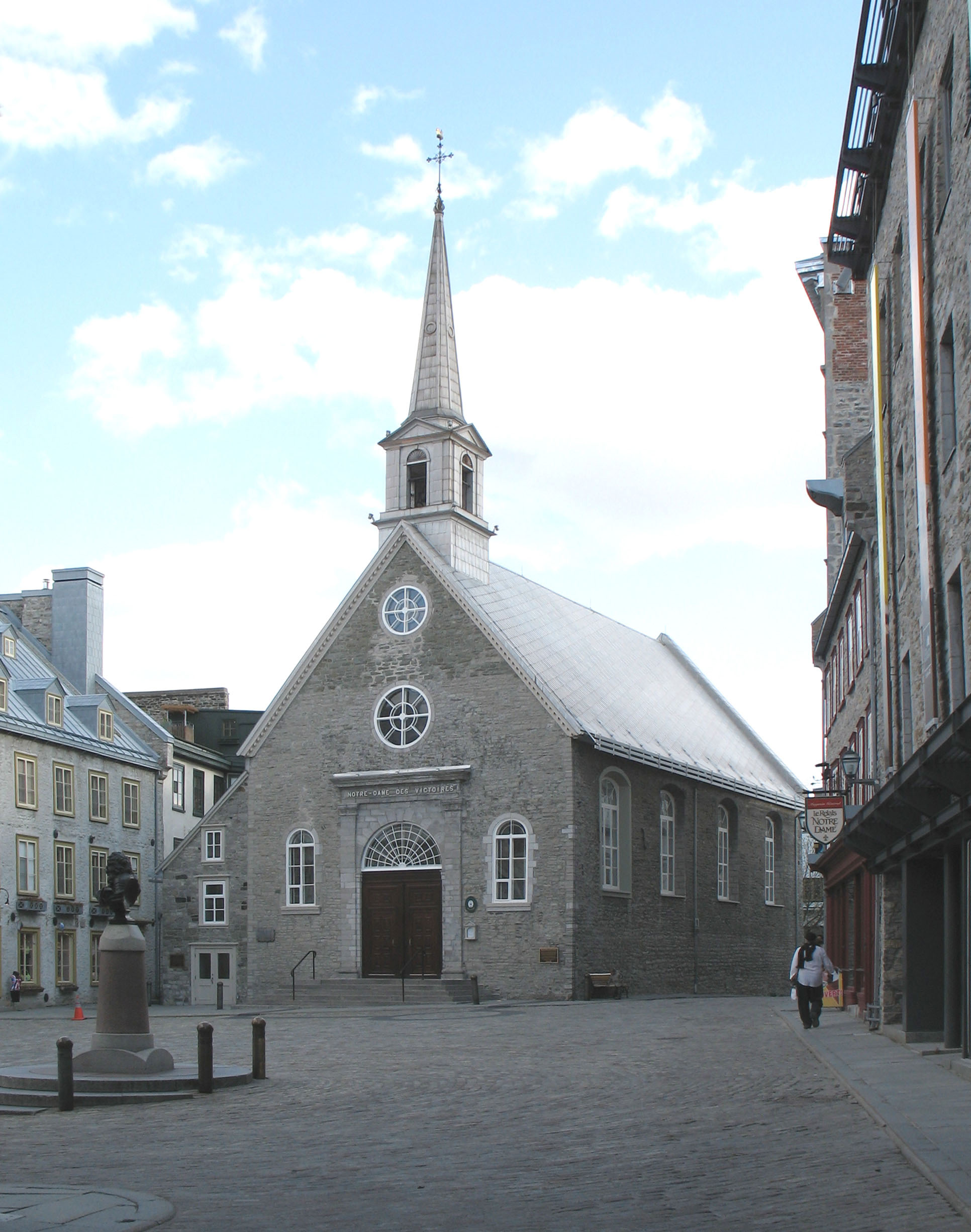 L'Église Notre-Dame-des-Victoires, à Place Royale dans le Vieux-Québec, Ville de Québec, Québec, Canada, Classée monument historique.